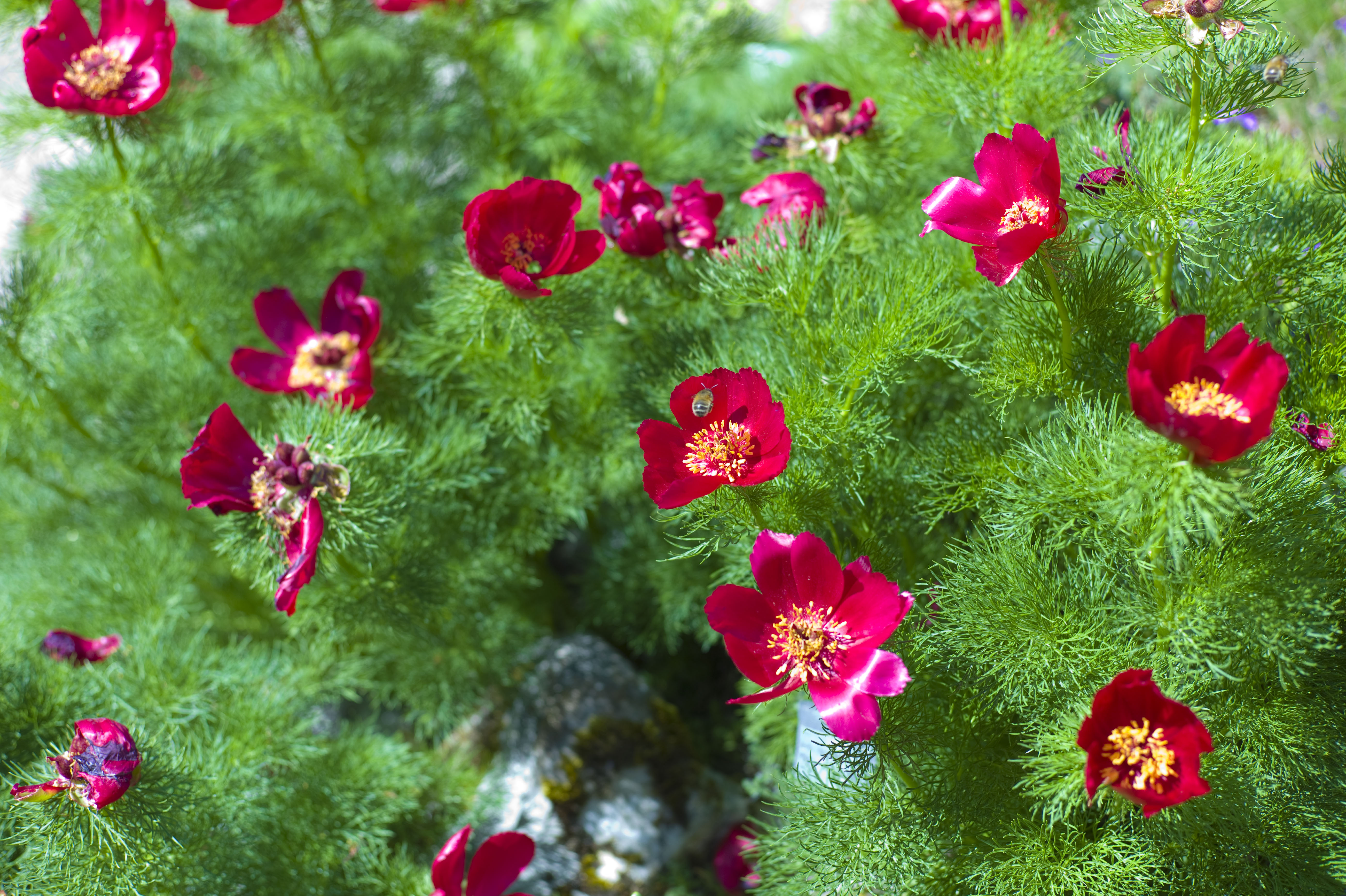 Paeonia tenuifolia